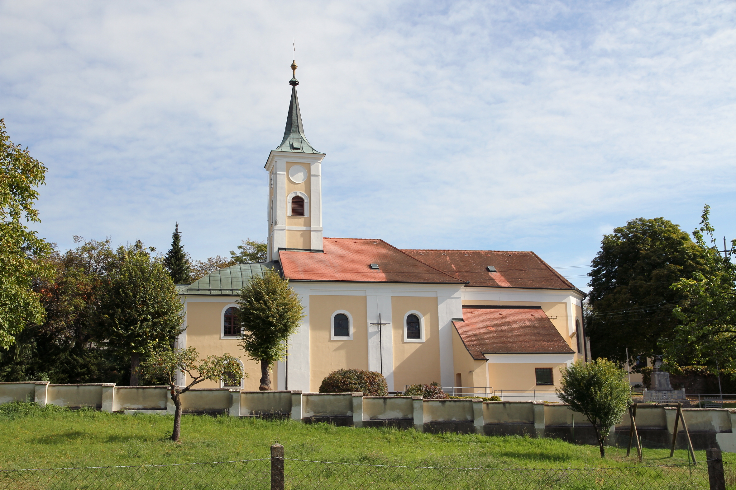 Katholische Pfarrkirche hl. Johannes d.Täufer in Gösing am Wagram, ein Ortsteil der niederösterreichischen Marktgemeinde Fels am Wagram. Das Presbyterium wurde Mitte des 15. Jahrhunderts errichtet, das Langhaus und der Turm 1671/72. 1843 erfolgten größere Instandsetzungsarbeiten, unter anderem wurde das alte Vorhaus abgetragen und ein neues mit einer Länge von ca. 7 m Länge angebaut.